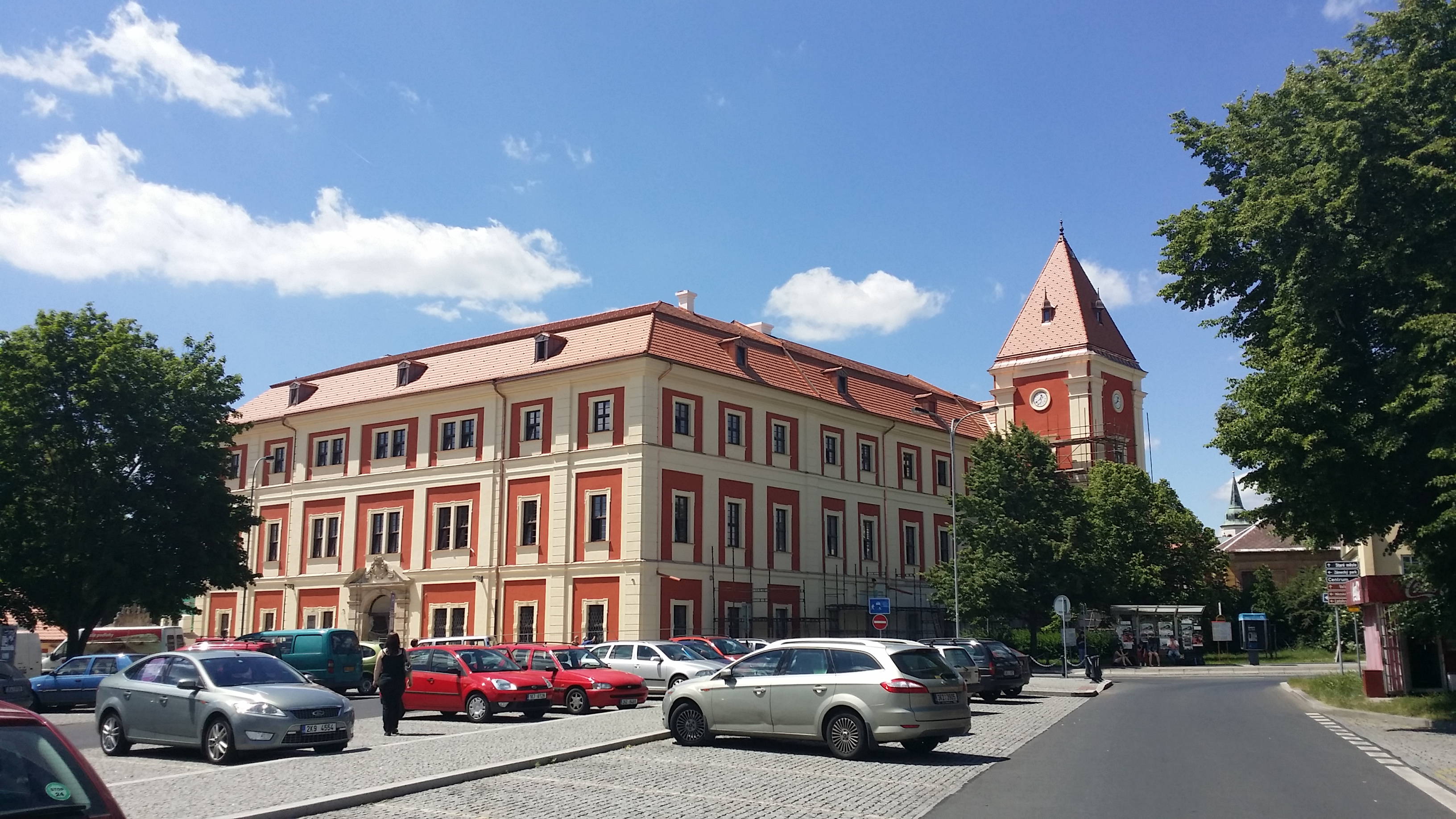 Zámek Ostrov, Jáchymovská 1, Ostrov (okres Karlovy Vary).